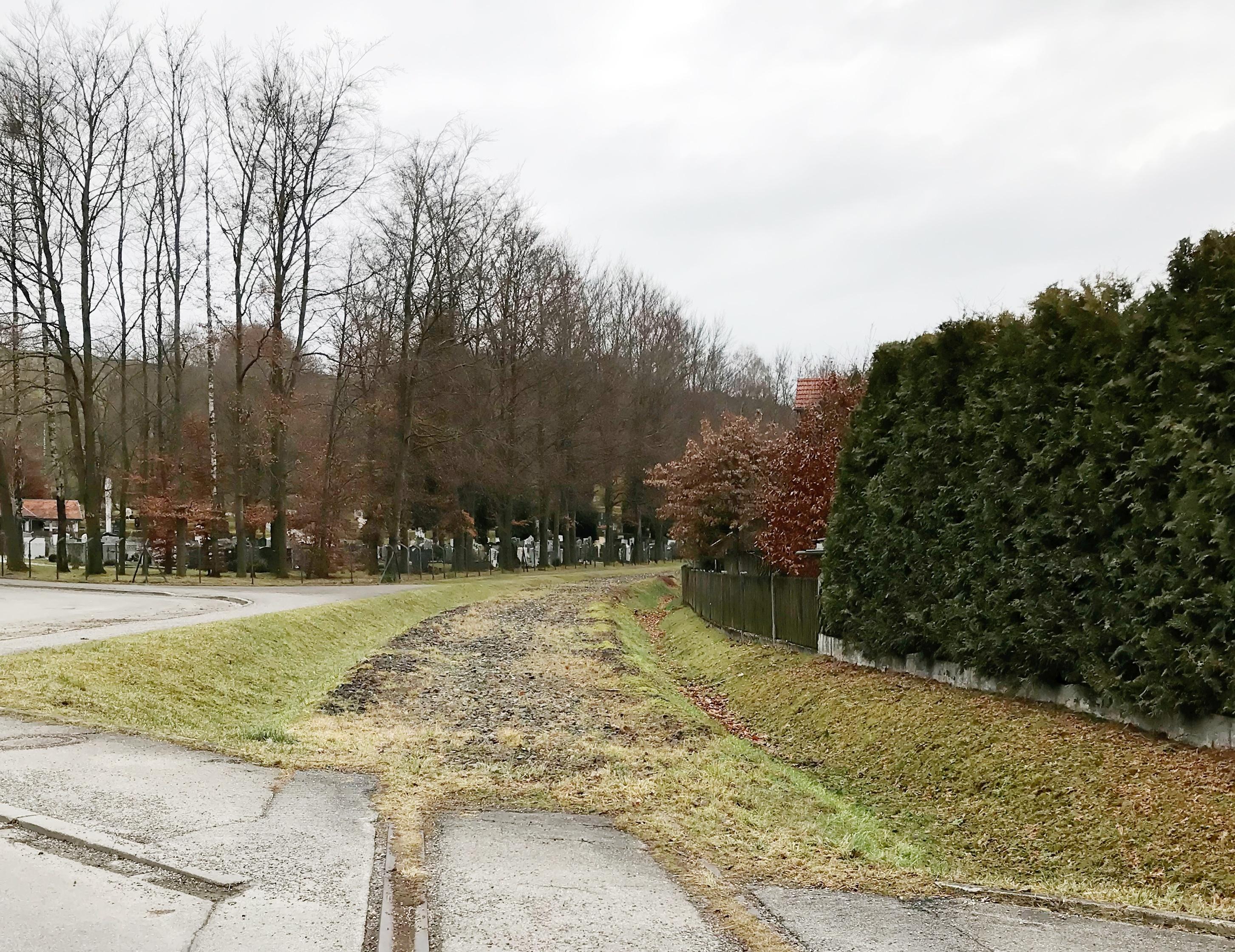 Bahnstrecke Weilheim–Schongau: Abzweiggleis zum ehemaligen Bergwerk östlich des Bahnhofs Peiting-Ost, Zustand Januar 2018